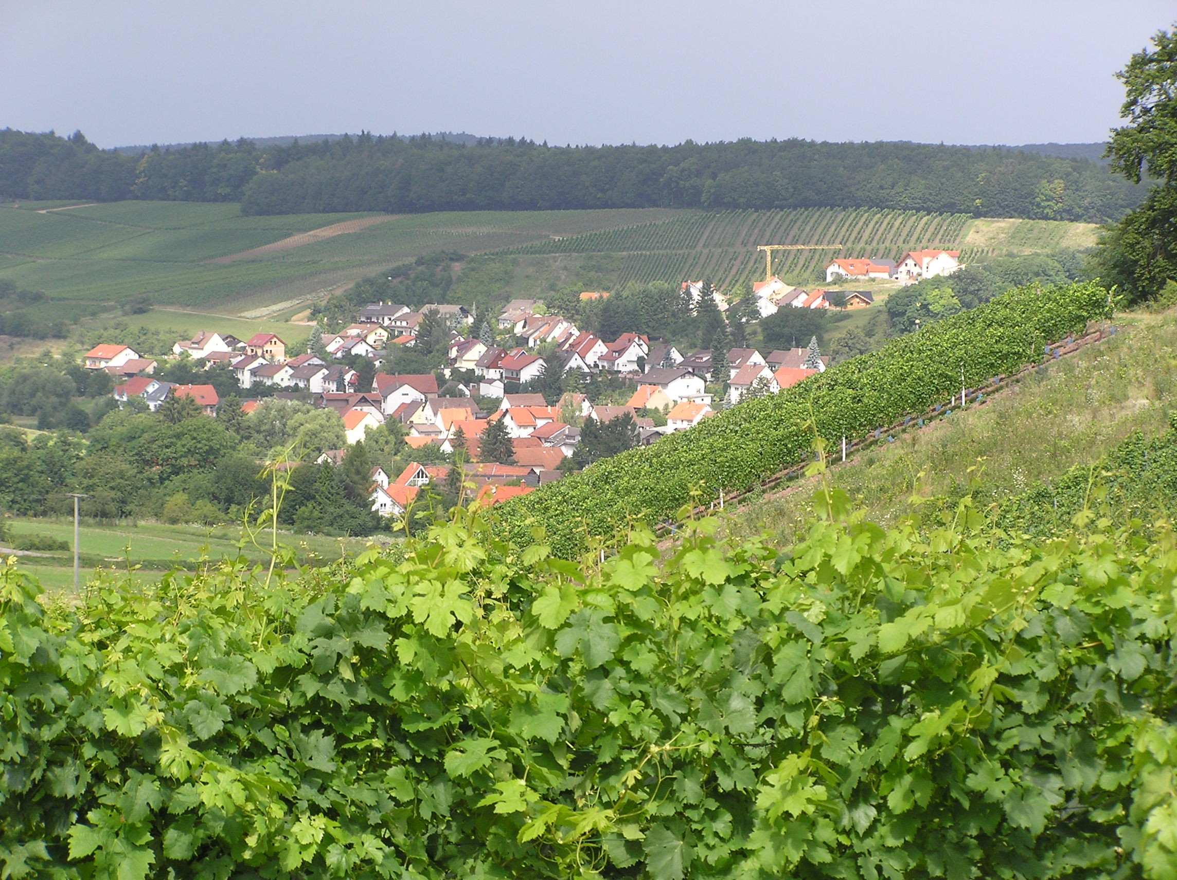 Blick vom Aufstieg zur Kreuzbergkapelle nach Tiefenbach, Östringen, Kraichgau